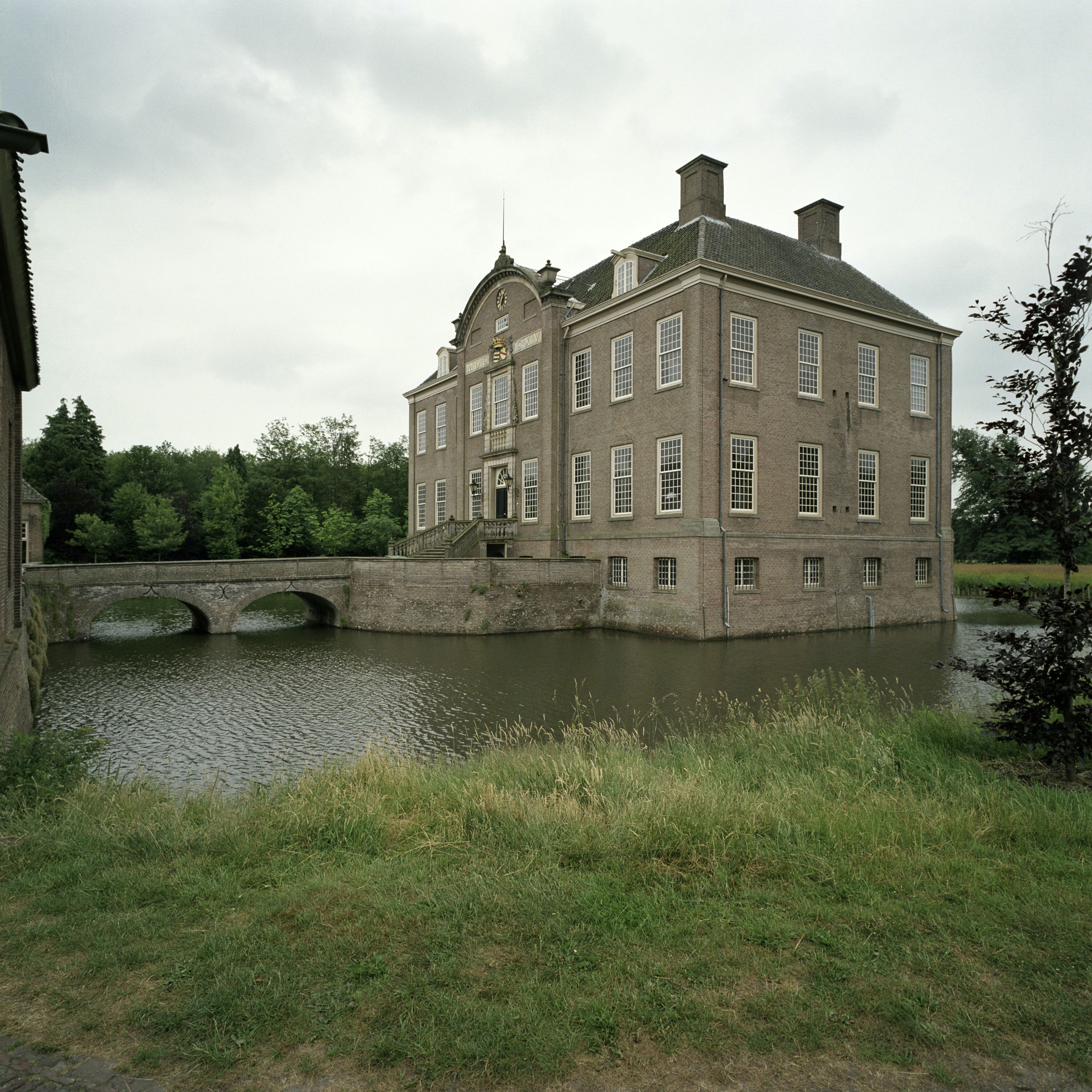 Eerde: Overzicht van de voorzijde en de rechter zijgevel, met zicht op de slotgracht en de dubbele boogbrug